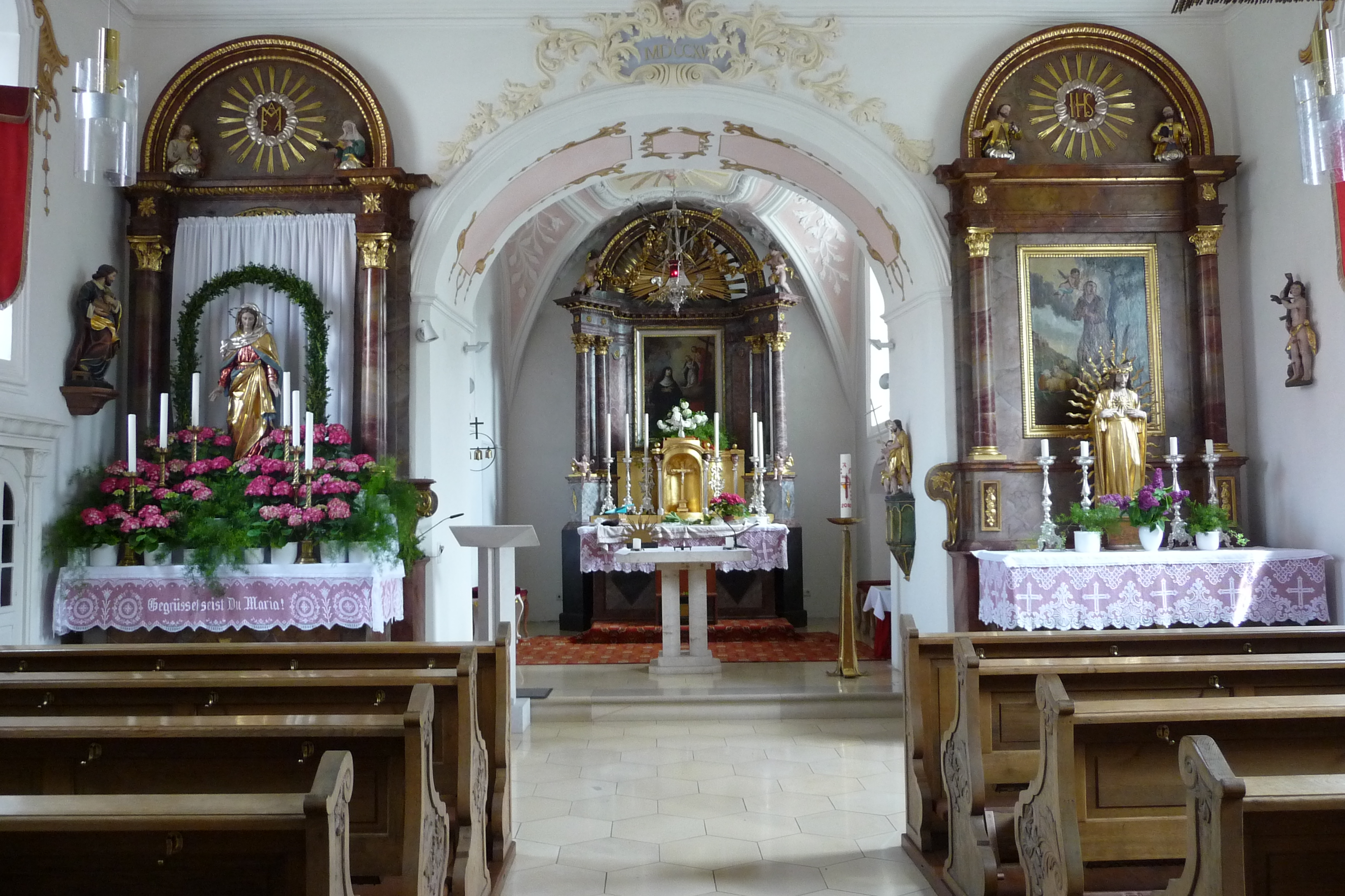 Der Chorraum mit den Altären der Pfarrkirche von Dinkelshausen